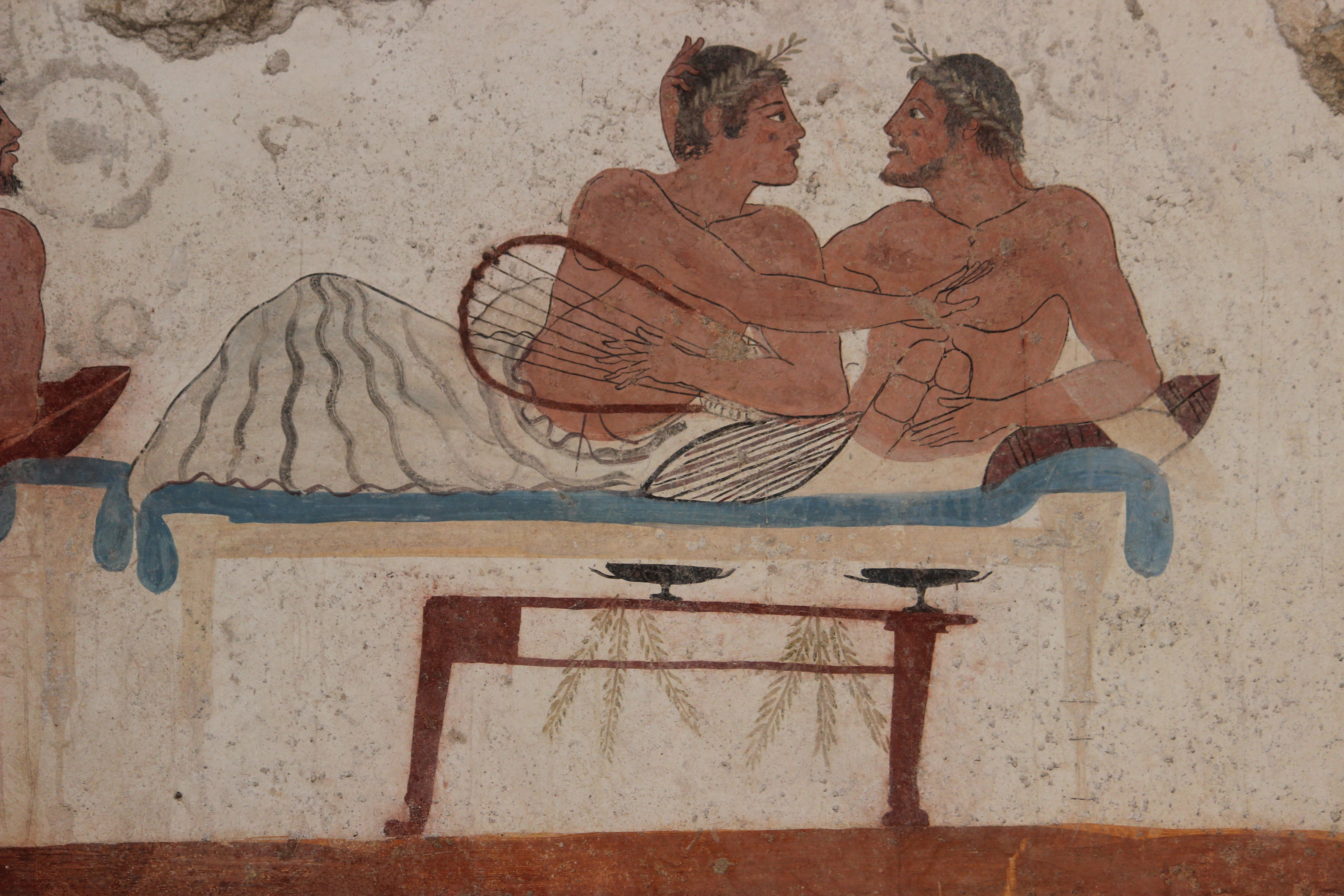 Paestum, Museo, pinturas de la tumba del nadador.